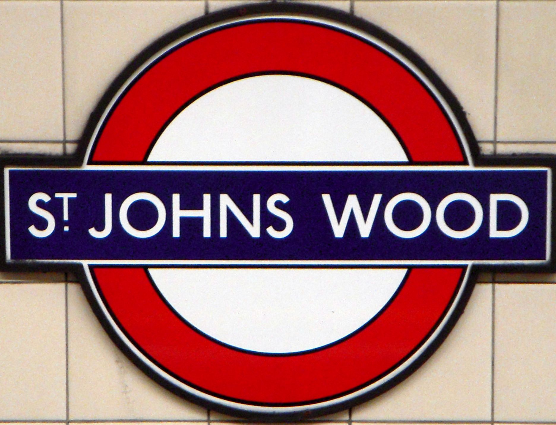 Skilt i Londons undergrundsbane